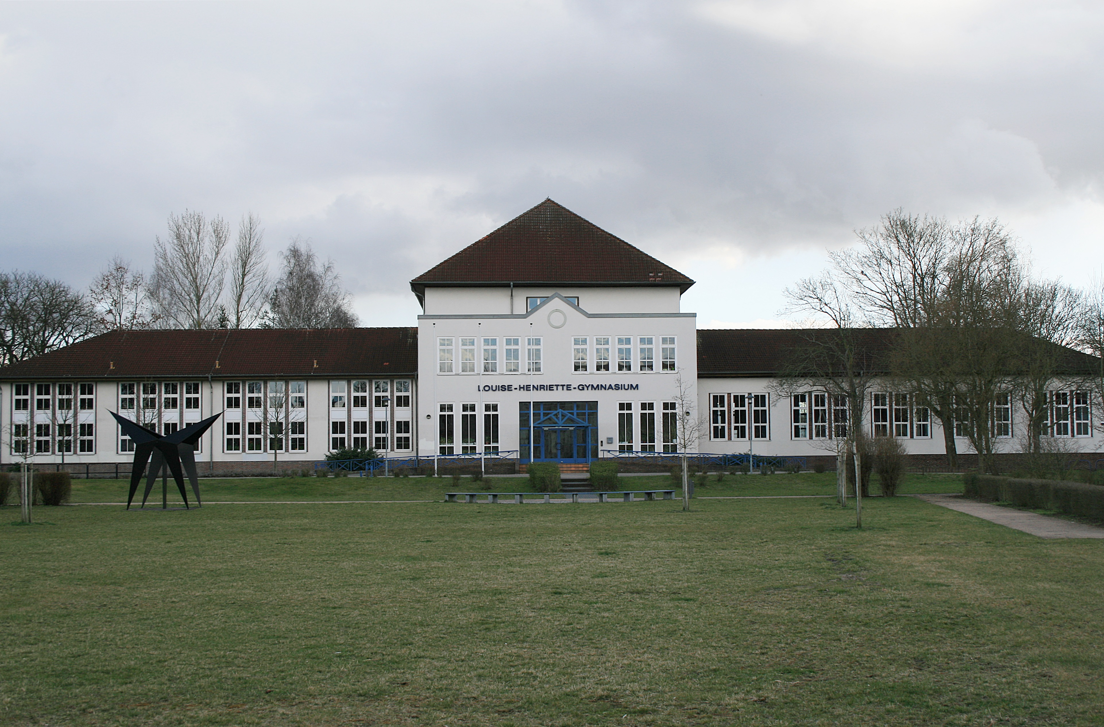 Ansicht Hauptgebäude